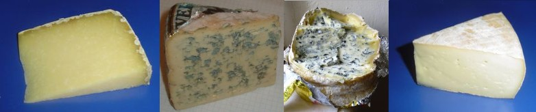 Les 4 fromages d'Auvergne les plus connus